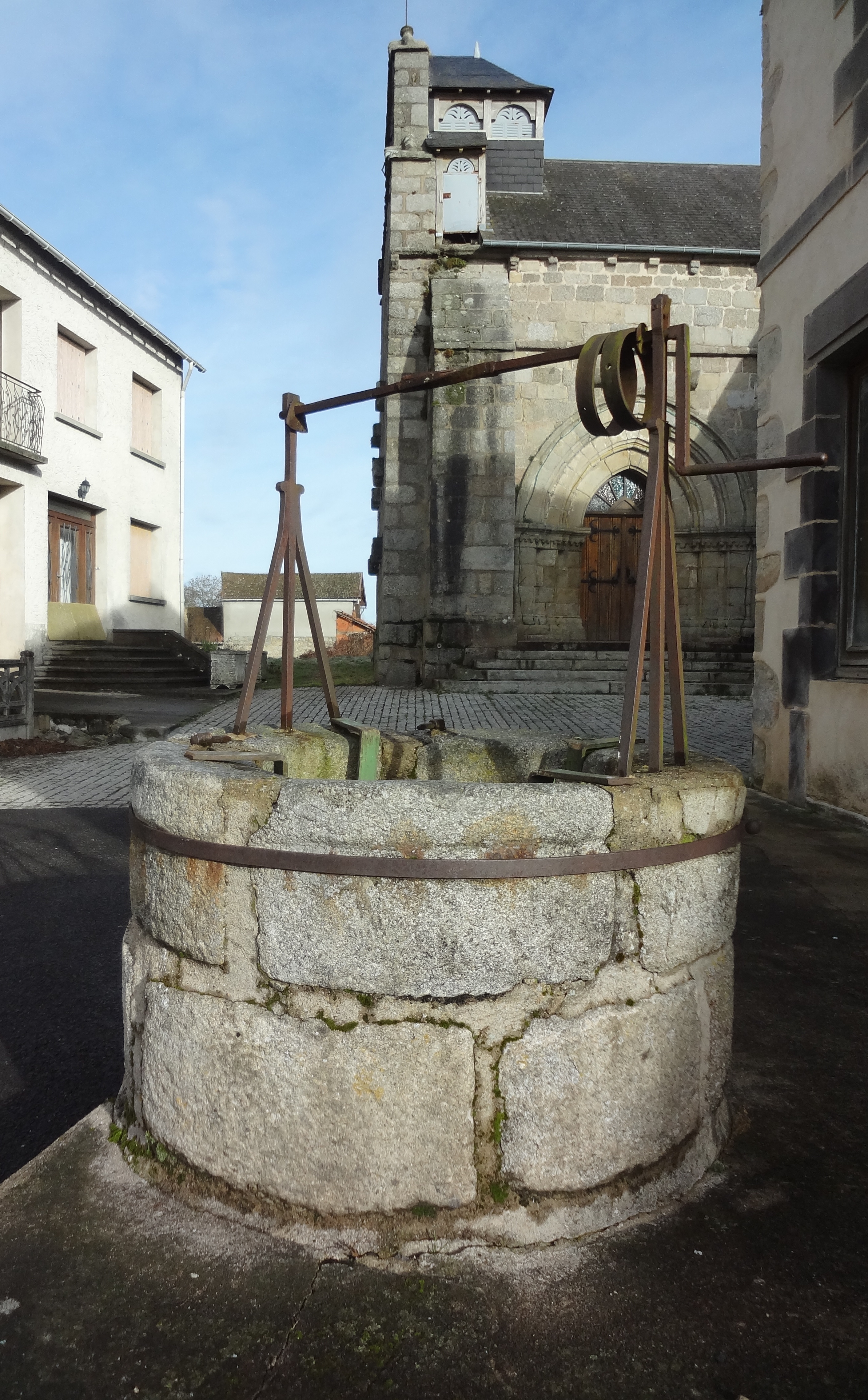 Puits et portail sud de l'église de Saint-Avit (63).